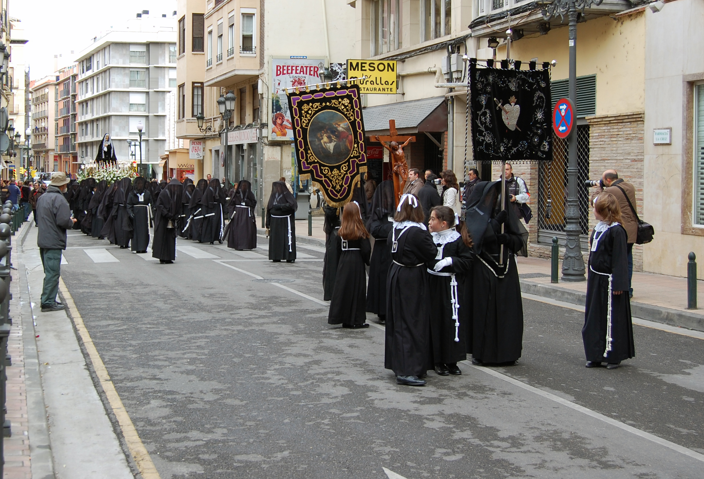 Esclavas de María Santísima de los Dolores (Zaragoza)